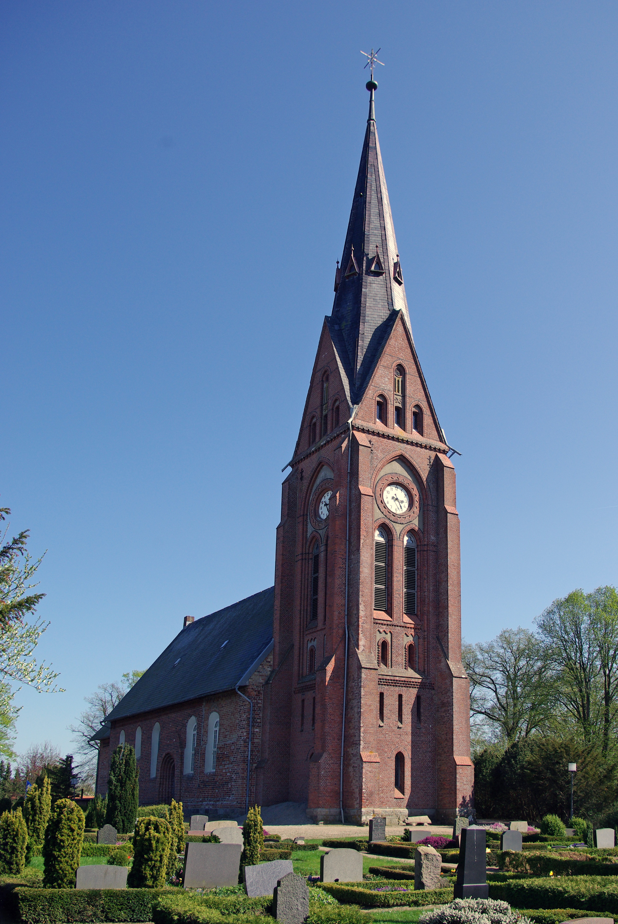 Sterup in Schleswig-Holstein. Die Kirche steth unter Denkmalschutz. Sie entstand in der zweiten Hälfte des 13. Jahrhundert.